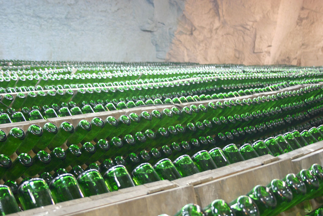 Sektkellerei in Artjomowsk, Ukraine